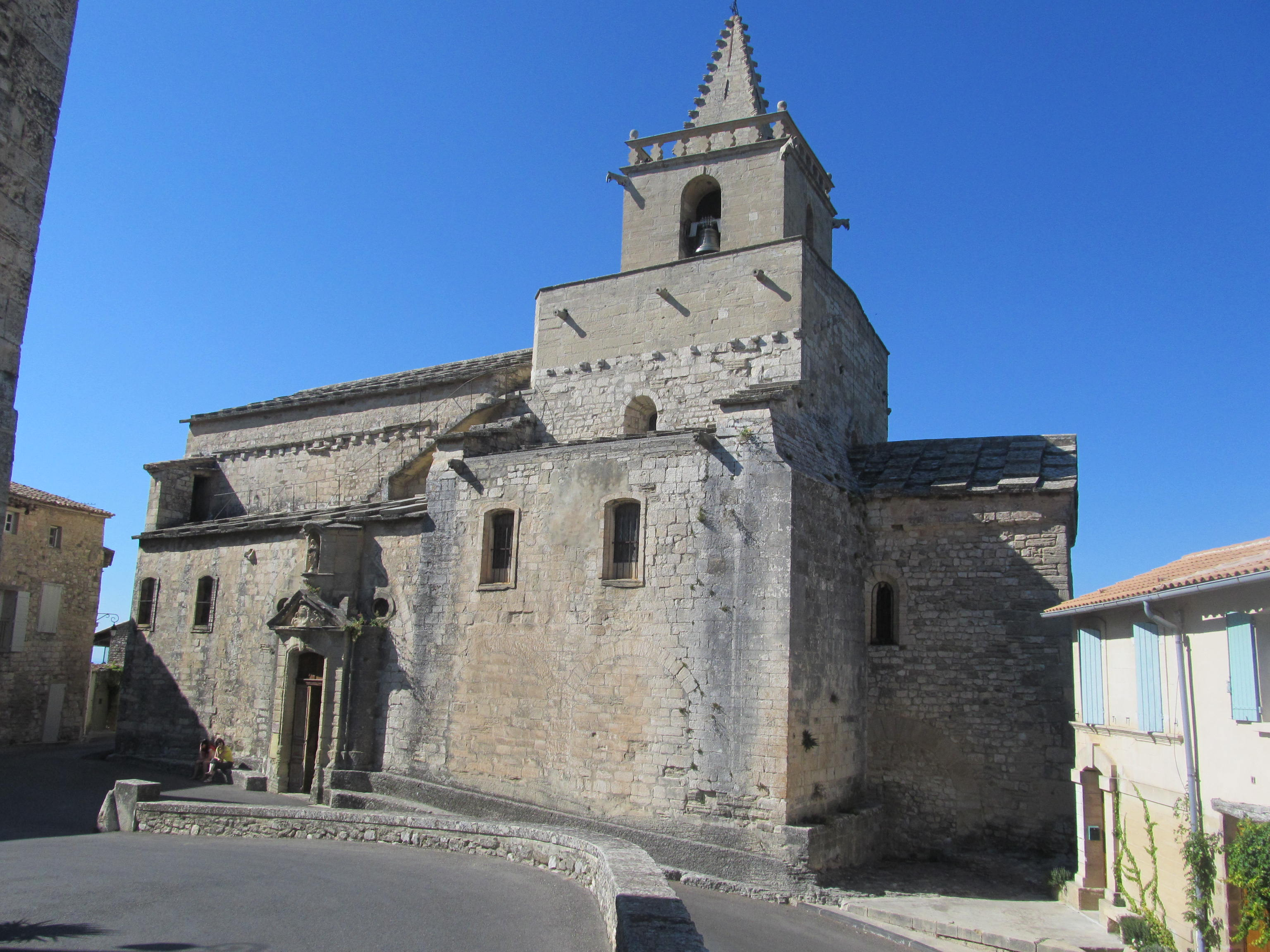 Kostel Panny Marie ve Venasque v Provence